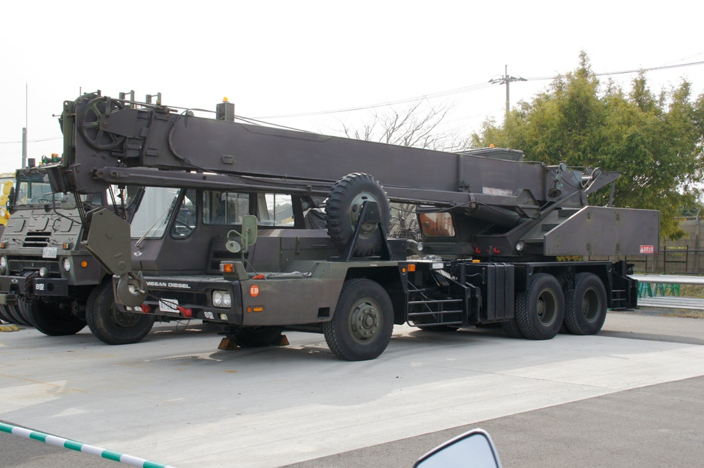 築城基地で撮影